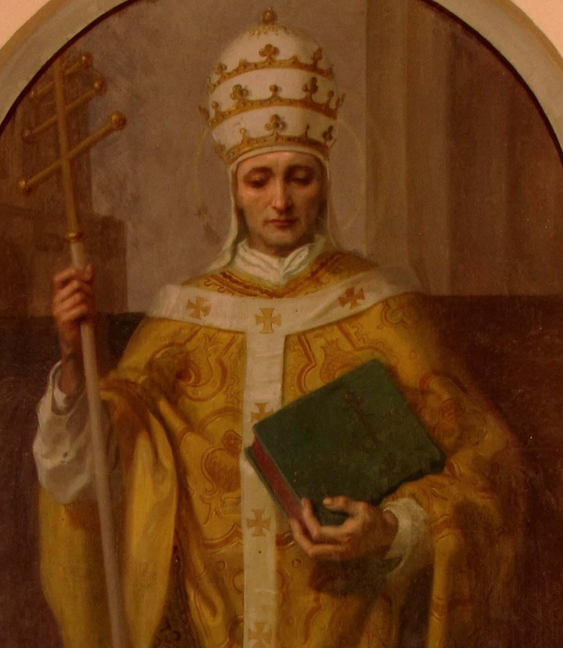 Alsace, Bas-Rhin, Dingsheim, Eglise St Kilian, Tableau "St Léon IX" (XIXe siècle)